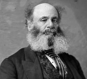 Dickson, Walter Hamilton Hon. (Senator) 1806 - 1885